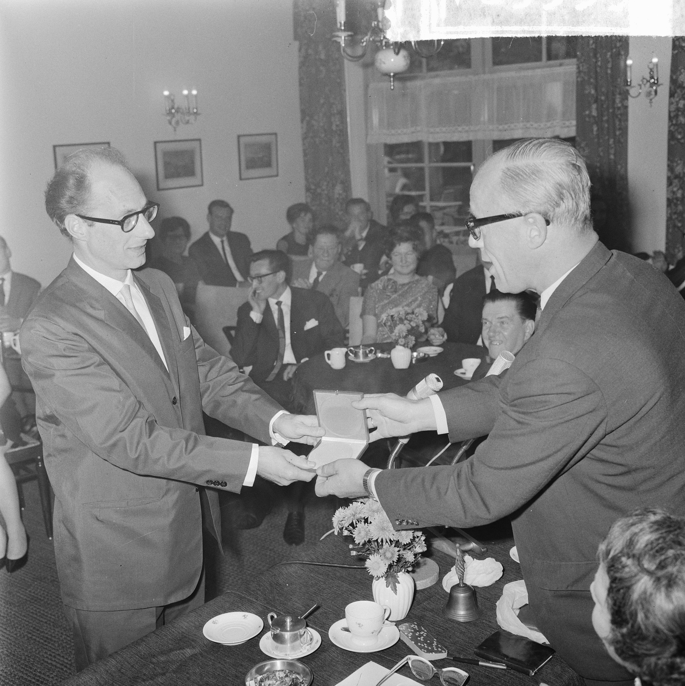 Collectie / Archief : Fotocollectie Anefo Reportage / Serie : [ onbekend ] Beschrijving : Uitreiking Nipkovschijven te Lage Vuursche voor de camera Kees van Langeraad (met bril) en Richard van Schoonhoven achter camera Datum : 28 september 1964 Trefwoorden : CAMERAS, Uitreikingen Persoonsnaam : Kees van Langeraad Instellingsnaam : Nipkowschijf Fotograaf : Pot, Harry / Anefo Auteursrechthebbende : Nationaal Archief Materiaalsoort : Negatief (zwart/wit) Nummer archiefinventaris : bekijk toegang 2.24.01.03 Bestanddeelnummer : 916-9339 Reacties Geplaatst door Documentaire liefhebber op 15 september 2017 - 17:57. Uitreiking Nipkovschijven te Lage Vuursche. Kees van Langeraad (links), NCRV's documentairemaker.